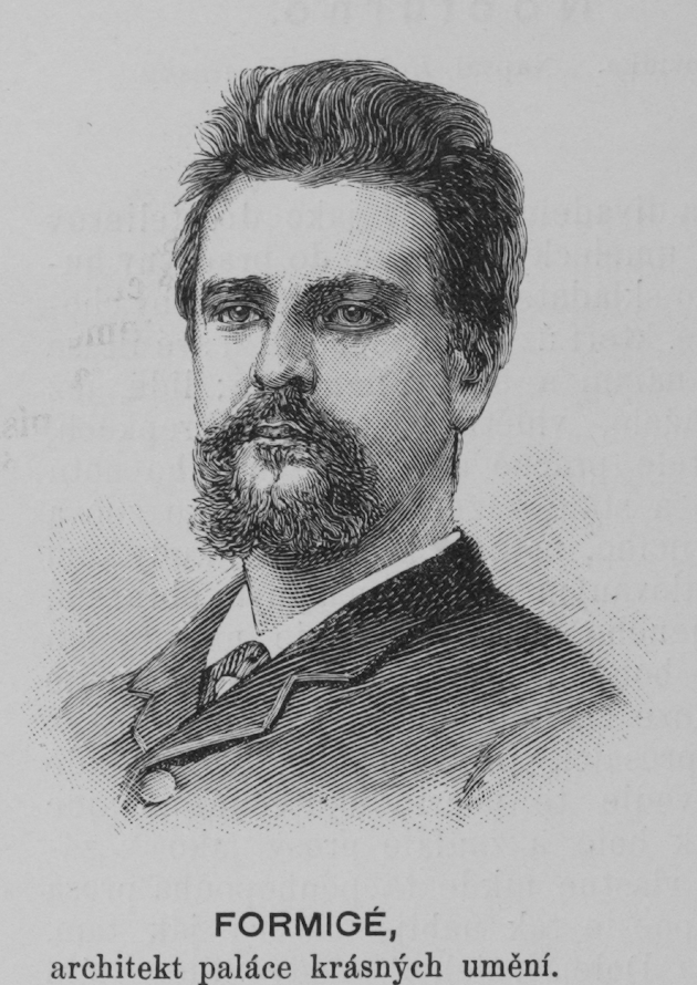 Portrait of Jean Camille Formigé (1845 - 1926), architect of "palais des Beaux-Arts" on Exposition Universelle in Paris 1889.